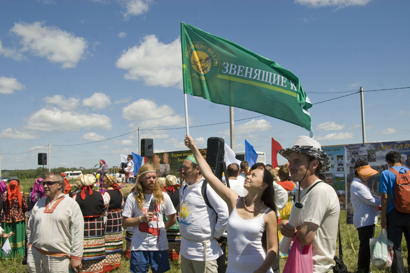 IV Международный фестиваль «Звенящие Кедры» в селе Устинка Белгородского района, родовое поселение «Серебряный бор».